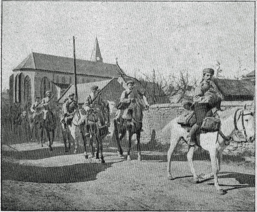 dans Pages de Gloire N° 31 p 8 du 4 juillet 1915, cavalerie Française du Maroc .